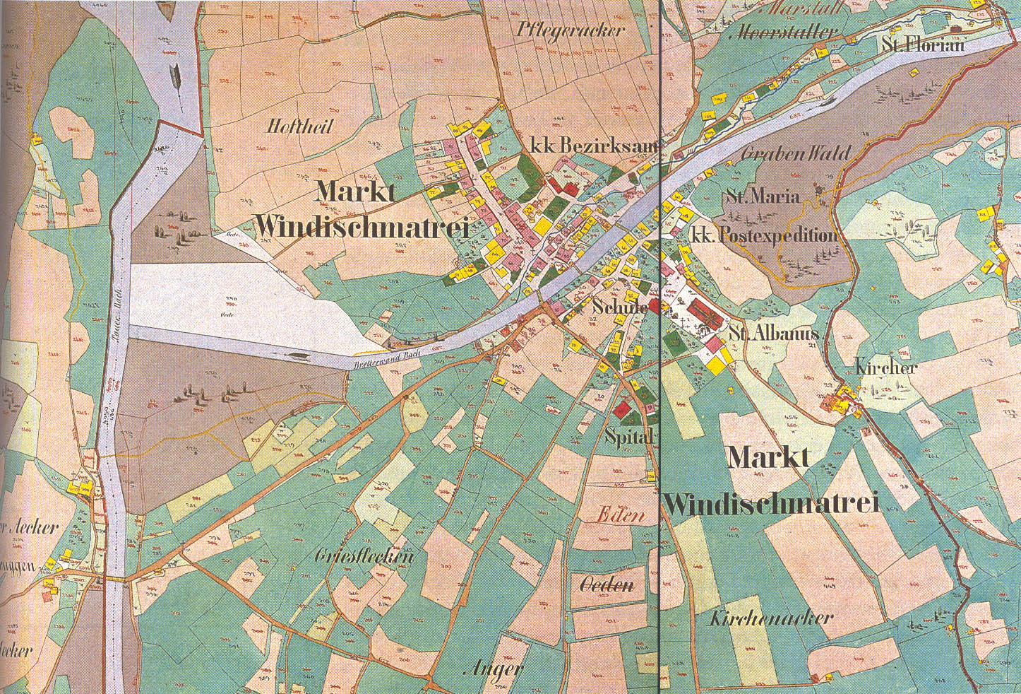 Die Katastral-Urmappe von Matrei in Osttirol um 1860. Legende: rosa = Steinhäuser gelb = Holzhäuser, Ställe und Futterhäuser rot = öffentliche Gebäude dunkelgrün = Gärten hellgrün = Wiesen beige = Äcker